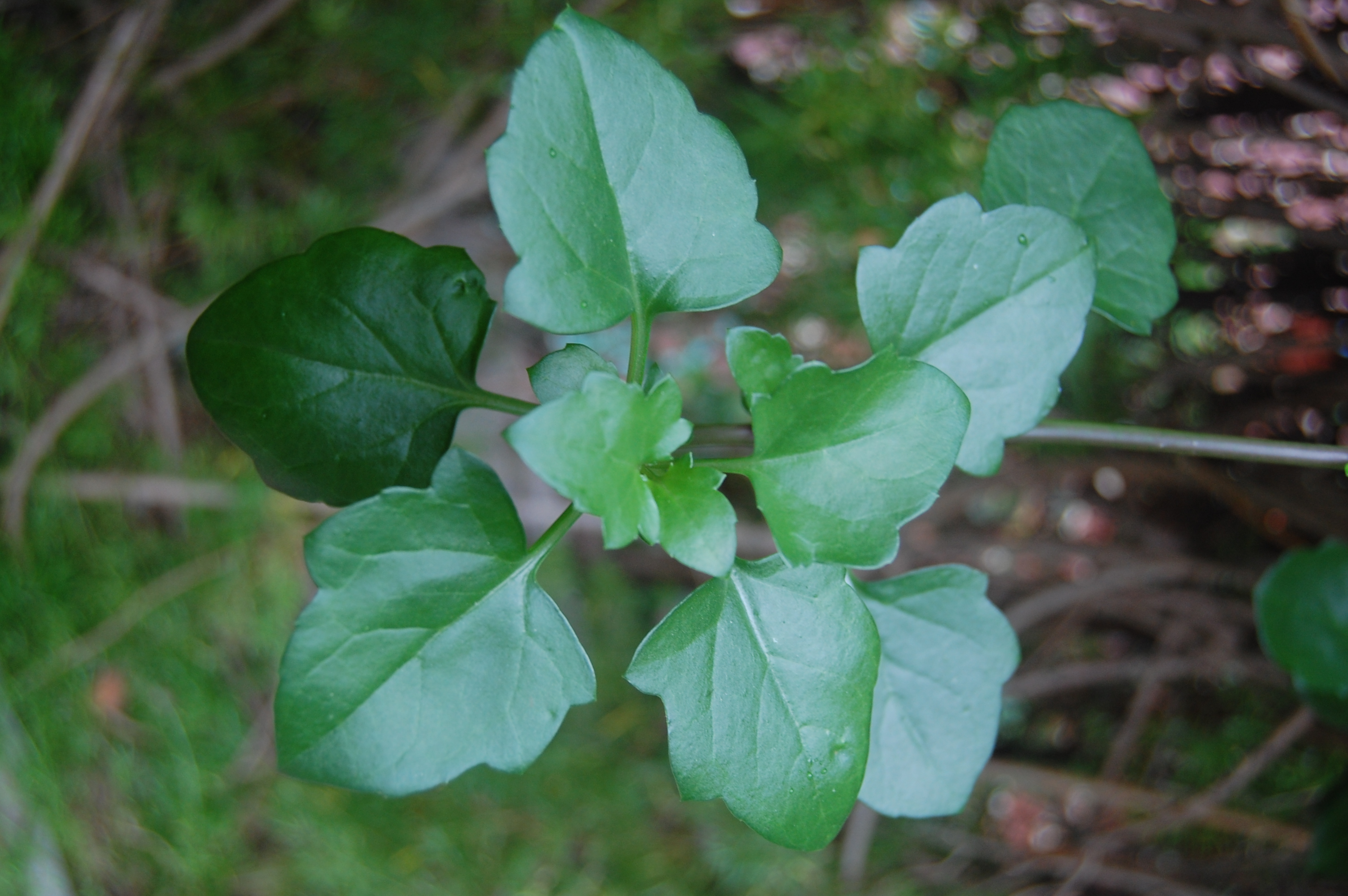 Senecio angulatus